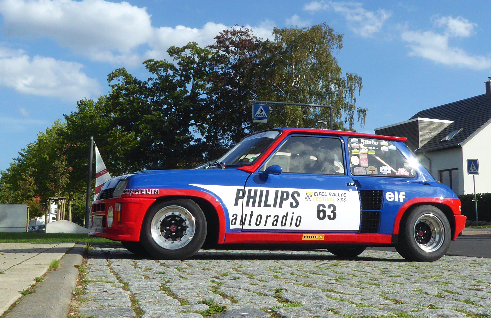 Renault R5 turbo 2 mid-engine 118 KW 160 pk achterwielaandrijving - 1983-86 - Foto 2018 © Wolfgang Pehlemann P1270473